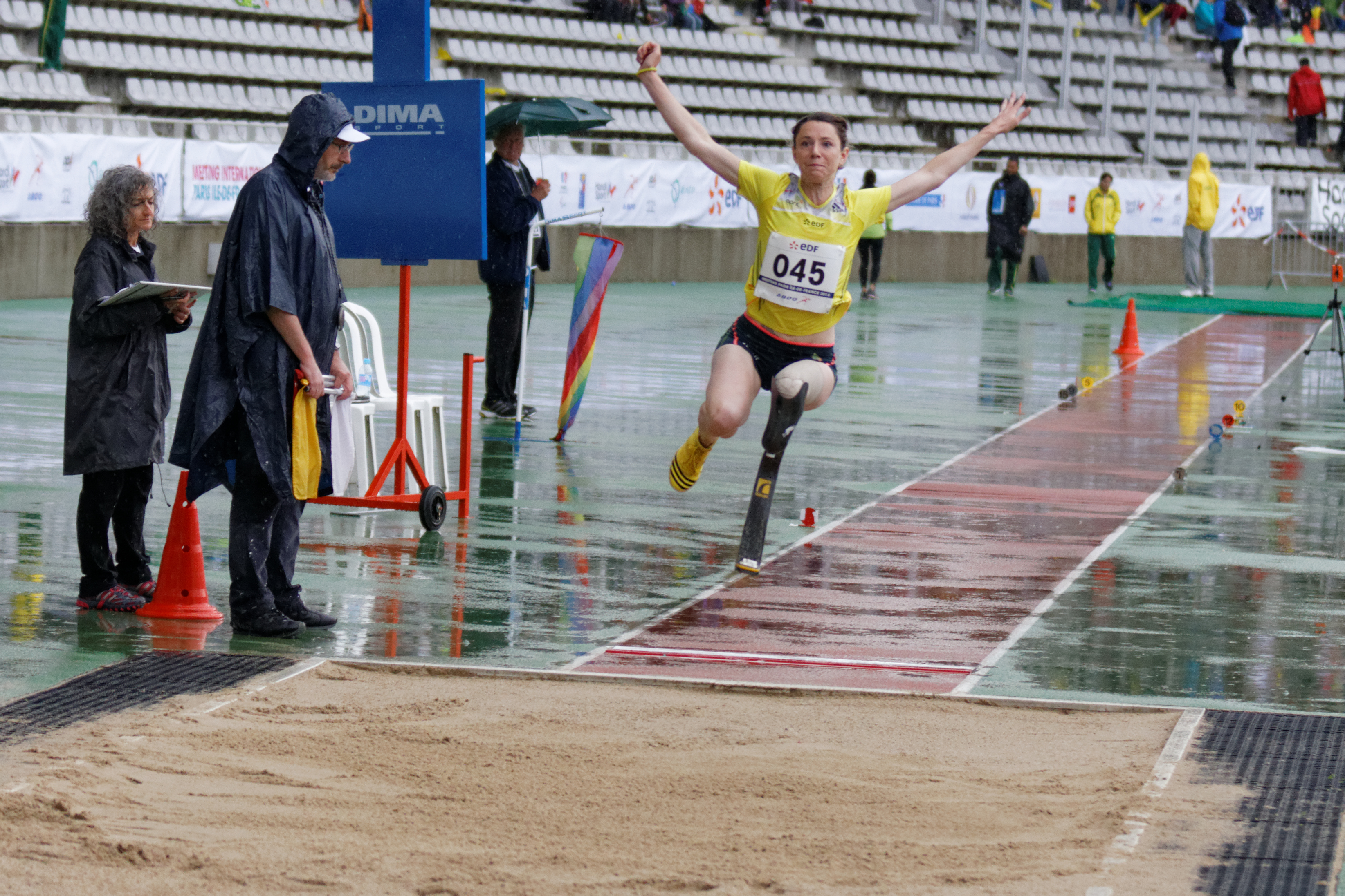 Marie-Amélie Le Fur au saut en longueur, Meeting d'Athlétisme Paralympique de Paris, 4 juin 2014.